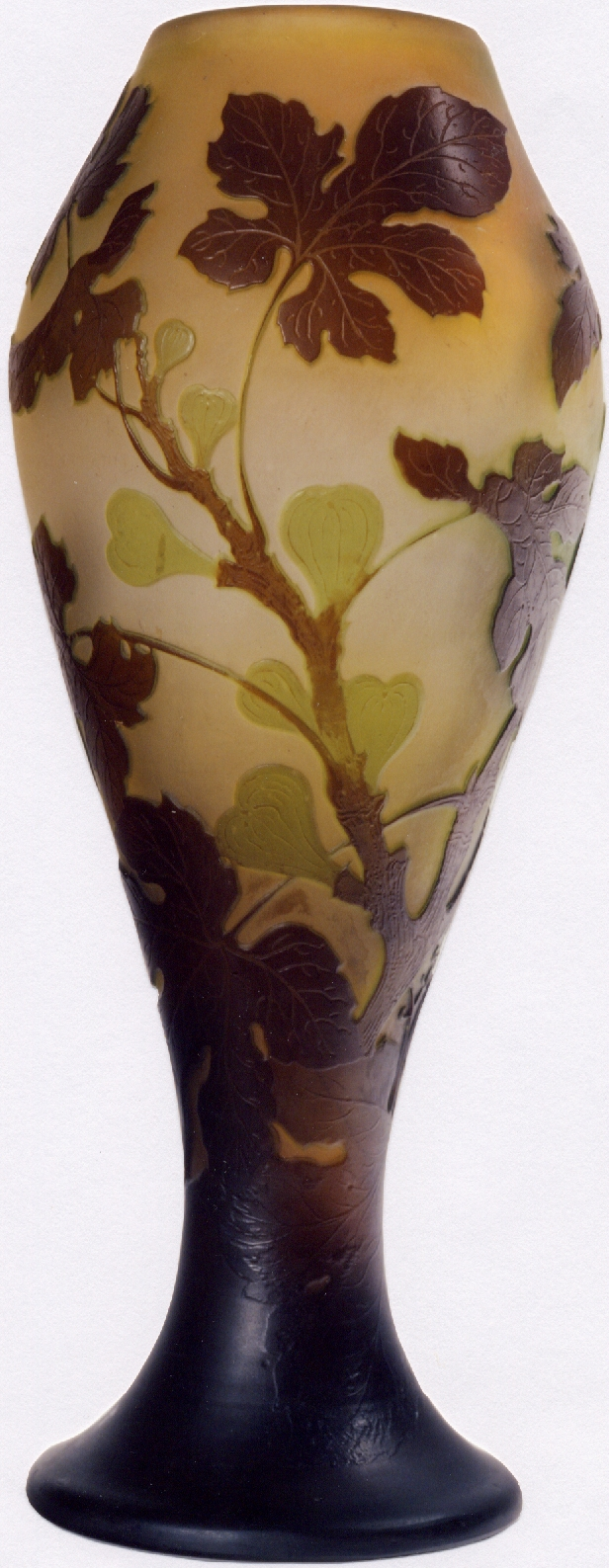 Gerro camafeu de la col·lecció del Museu Deu